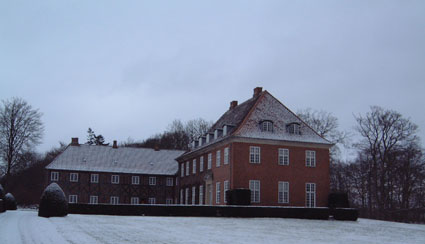 Barritskov, 2001